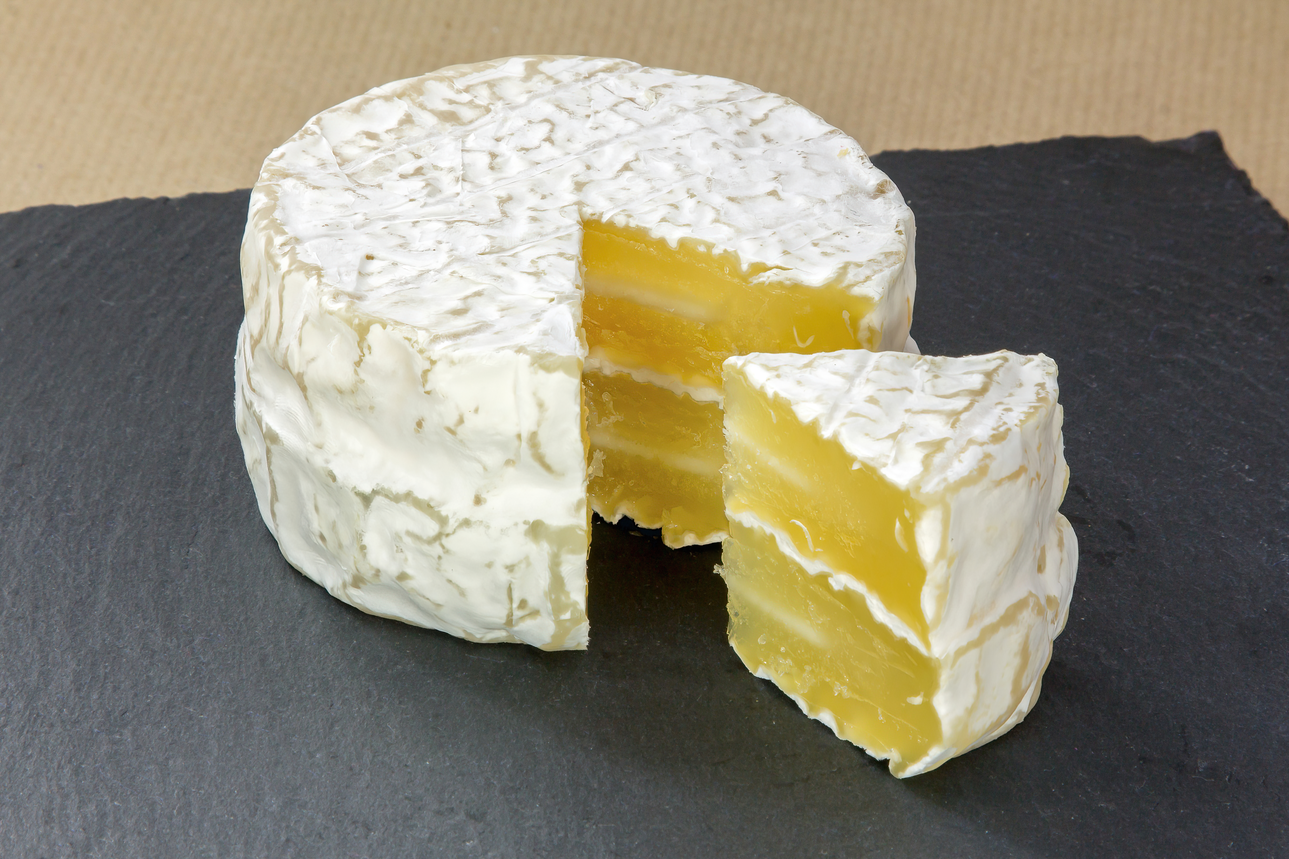 Loose Korbkäse